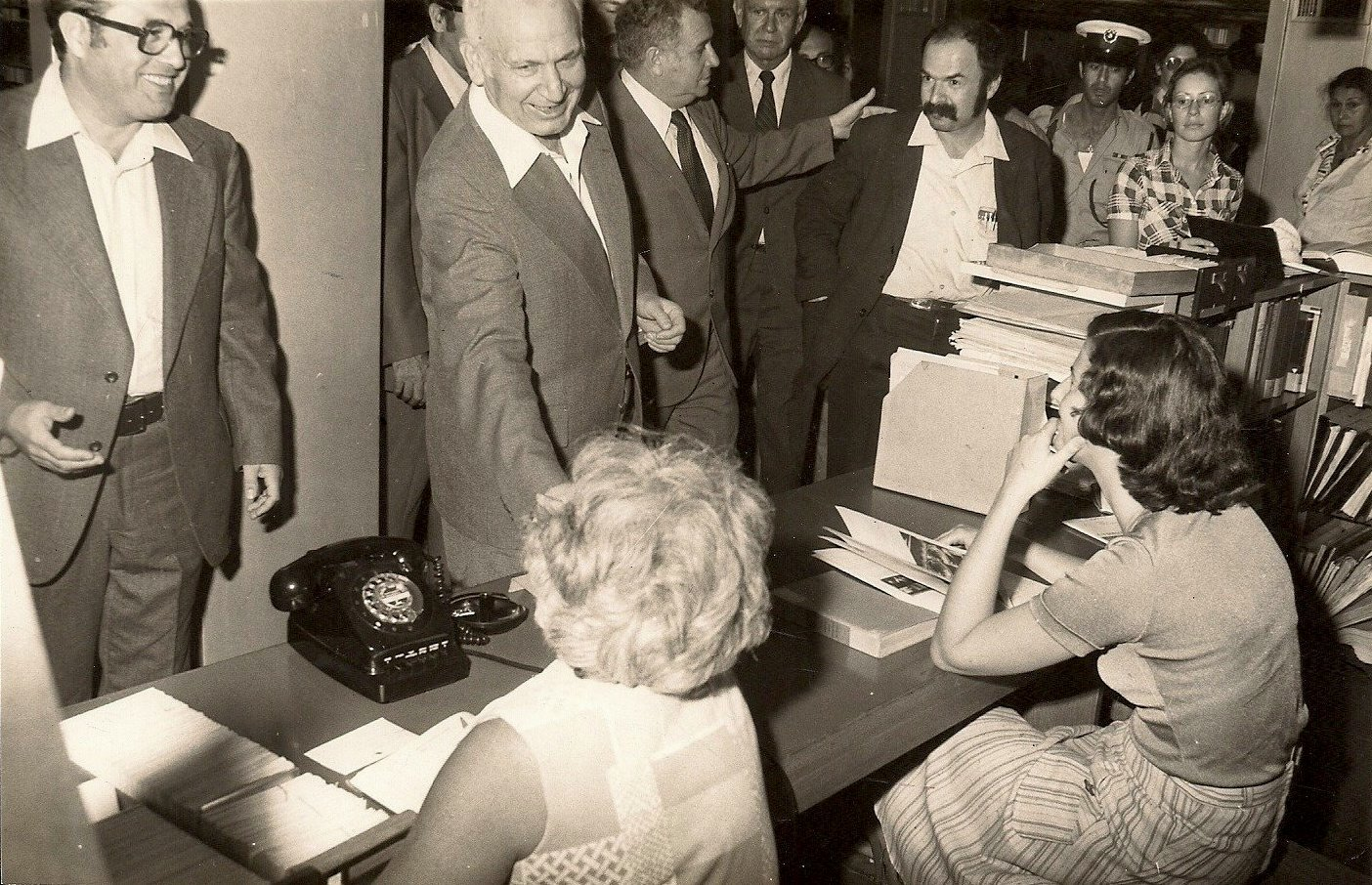 ביקור אפרים קציר, הנשיא הרביעי של מדינת ישראל (1973-1978), בספרית אוניברסיטת חיפה, 15.11.1976; מימינו של אפרים קציר, שמואל סבר, מנהל ספריית אוניברסיטת חיפה, ומשמאלו, אליעזר רפאלי, נשיא אוניברסיטת חיפה (1973-1977). הספרניות: בצד שמאל, רינה אירמאי, בצד ימין, שרה שפיגל.